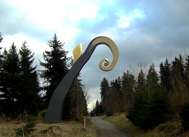 Krummstab (von Heinrich Brummeck), Waldskulpturenweg, Schmallenberg-Schanze, Germany.